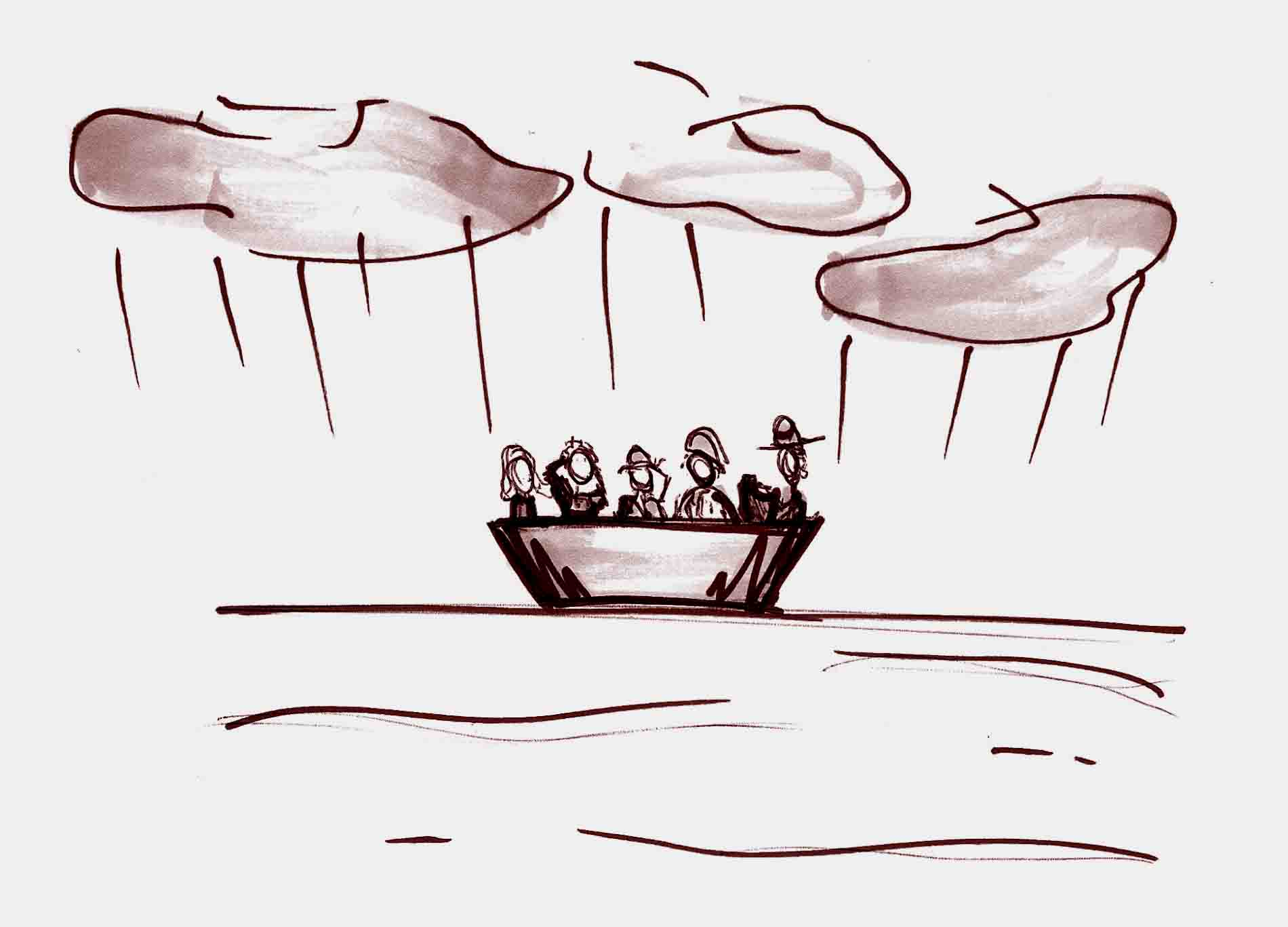 ilustração de refugiados climáticos